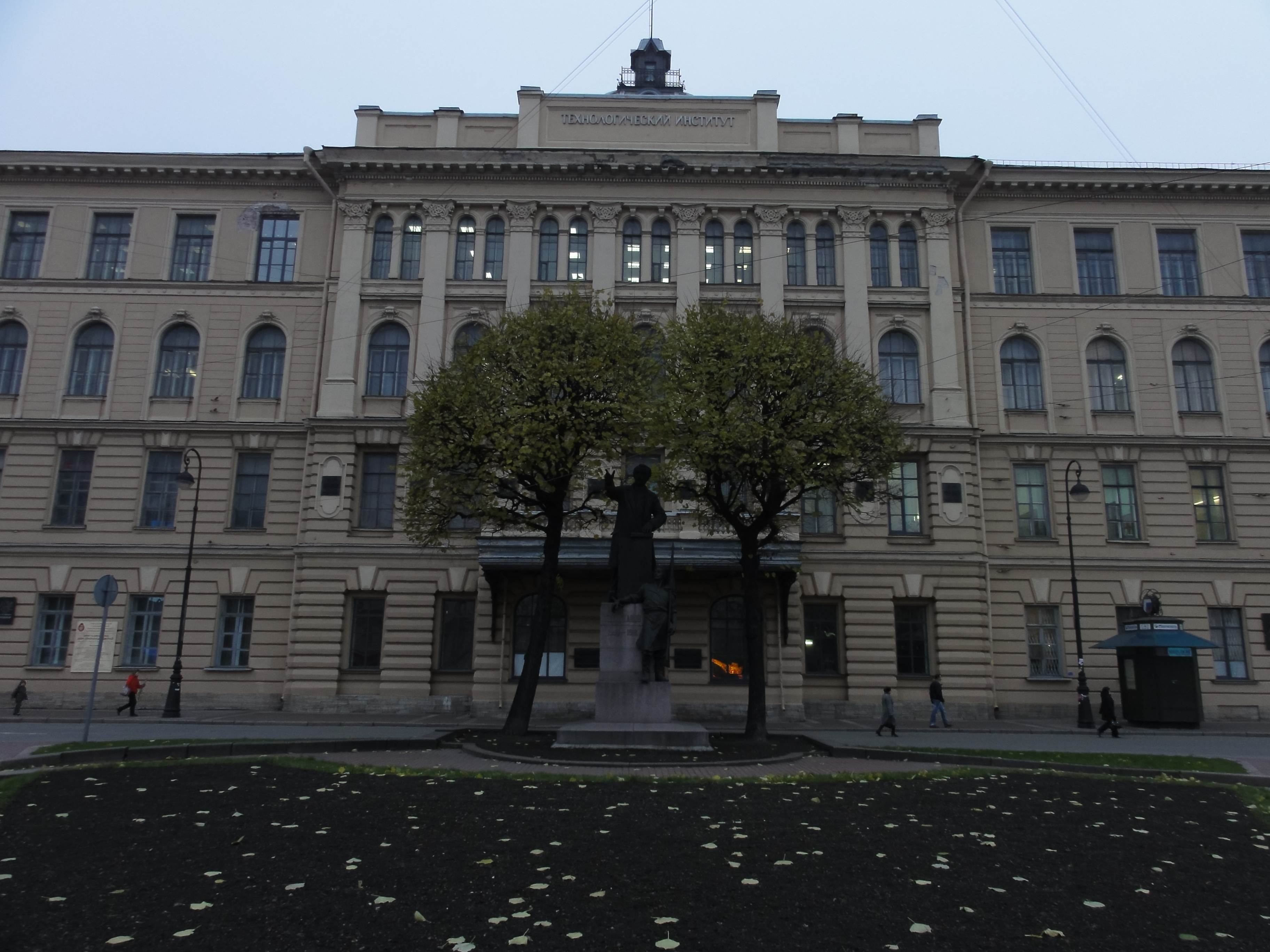 Instituto Tecnológico, San Petersburgo.